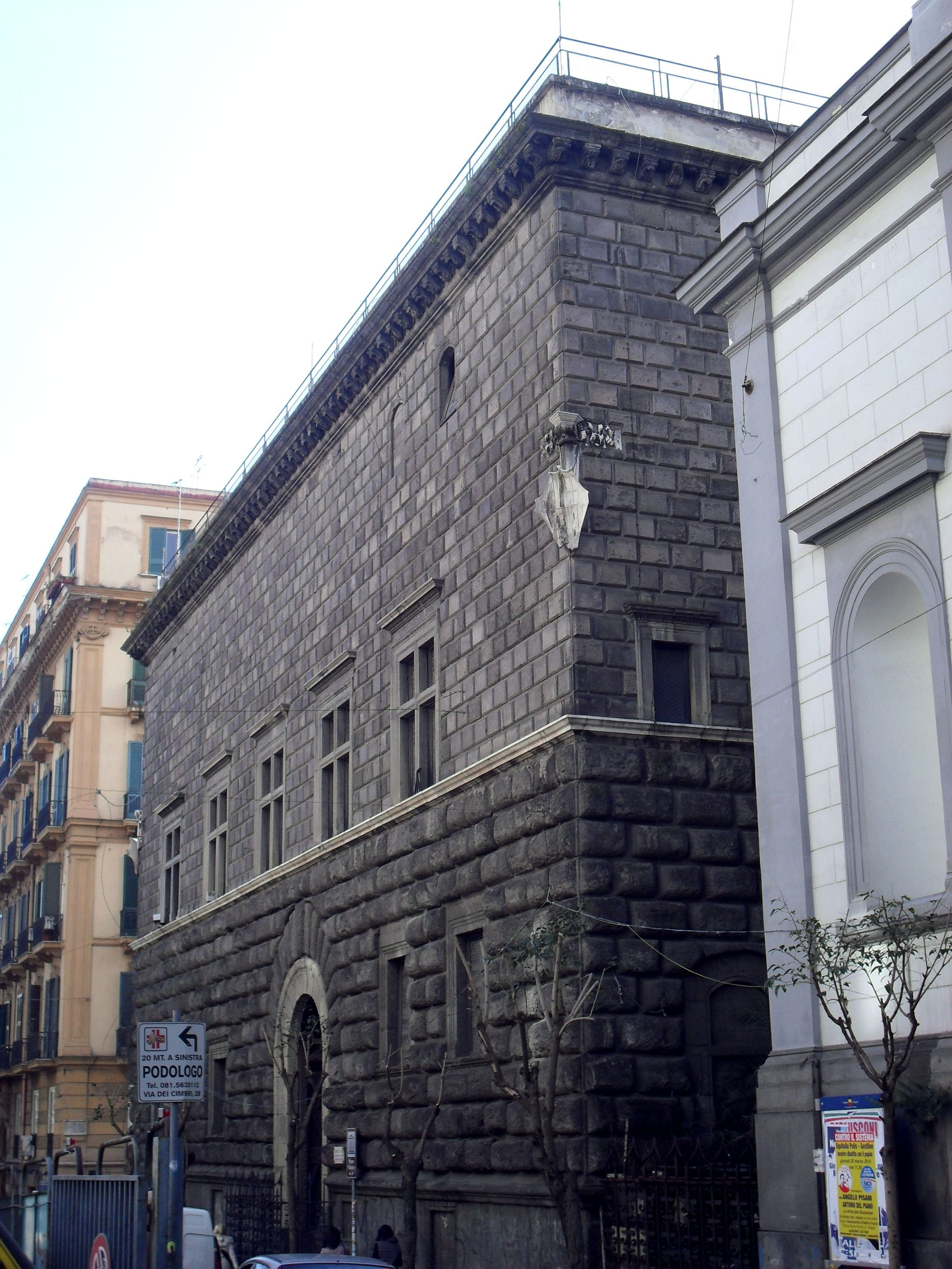 palazzo como (Napoli)